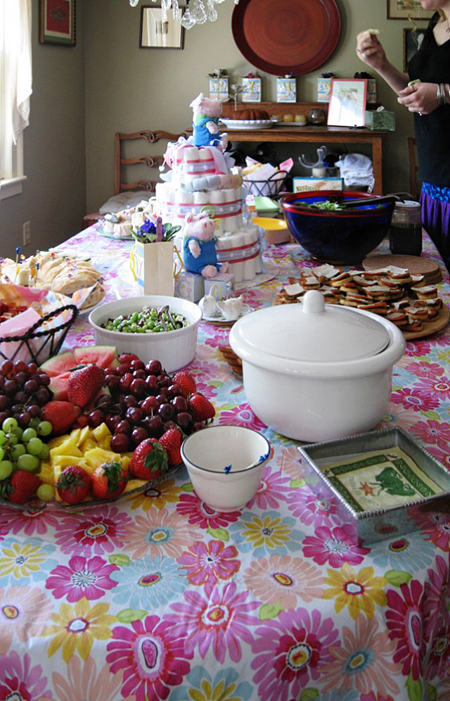 Kuchen- und Speisenbuffet bei einer Babyparty (englisch Baby shower), mit einer Windeltorte (engl. Diaper Cake) als „Tischdekoration“.